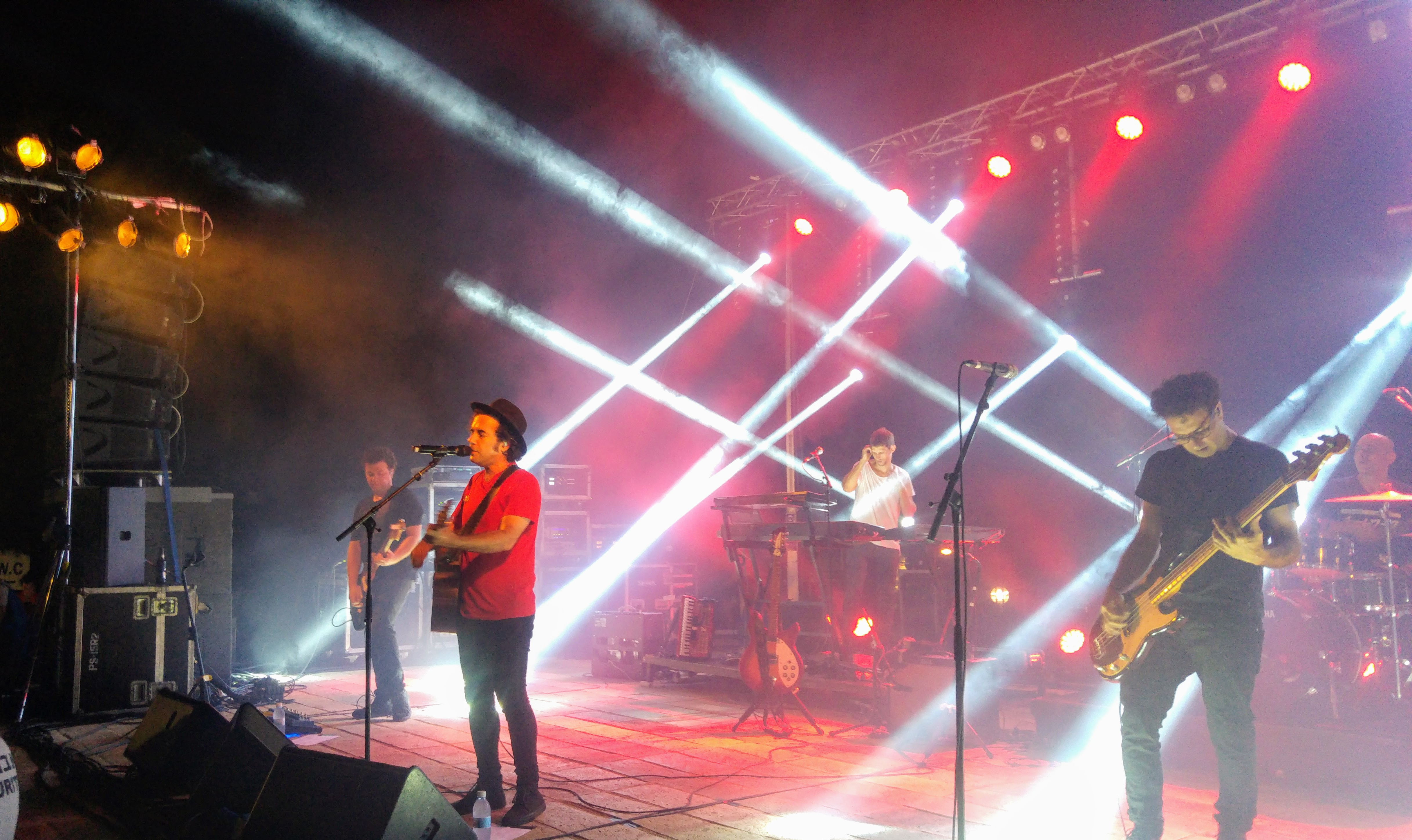 כנסיית השכל במופע בגן הפיסגה ביפו במסגרת לילות יפו, קיץ 2017 יורם חזן: שירה, גיטרה, סקסופון רן אלמליח: גיטרה בס דוד ראסד: גיטרה חשמלית דניאל זייבלט: תופים עמי רייס: קלידים